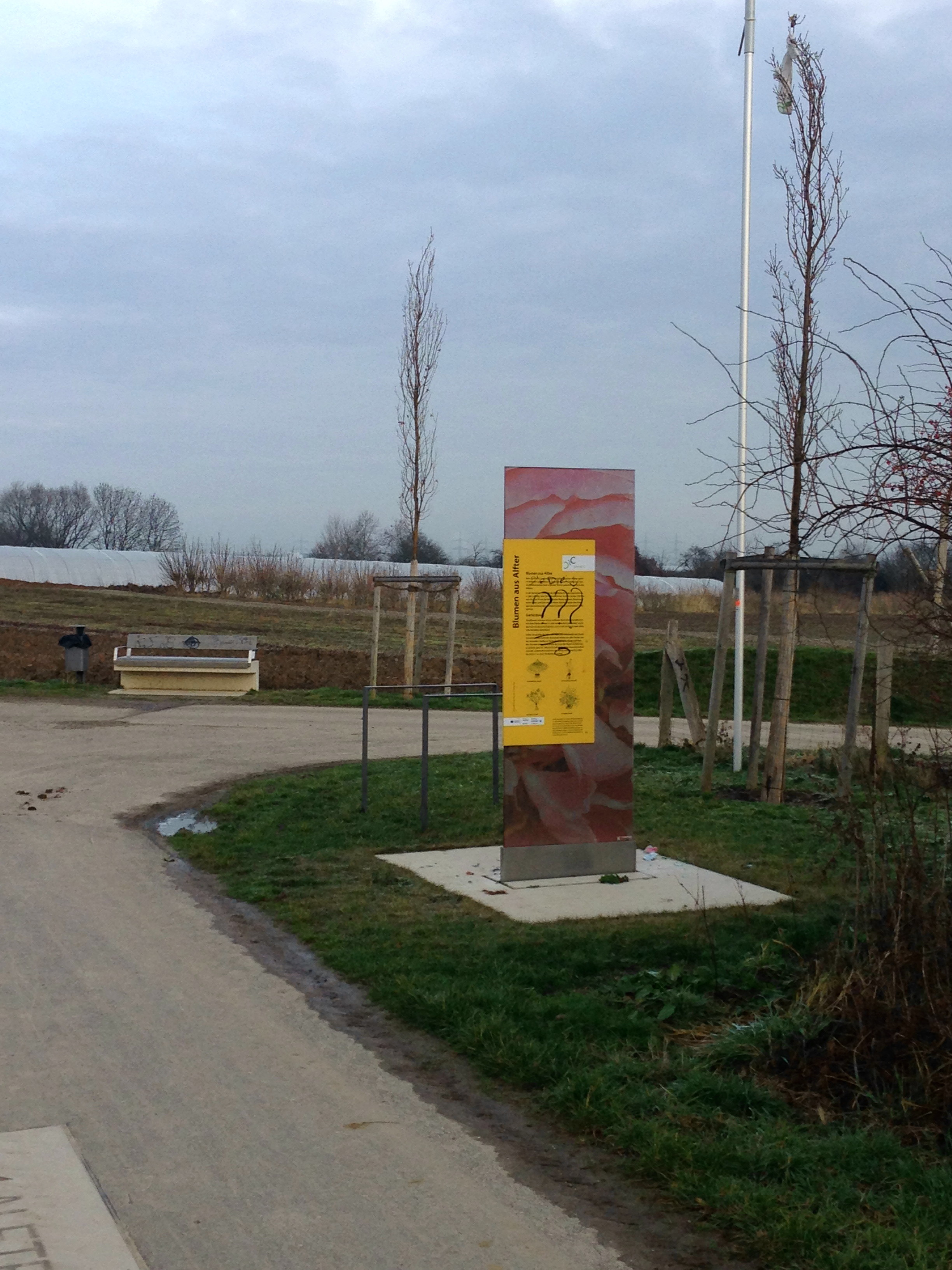 Infotafel Blumen aus Alfter